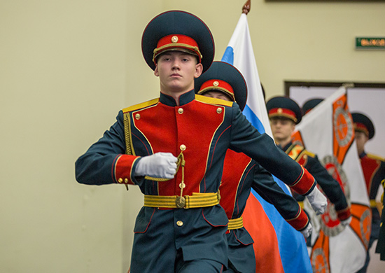 Кадеты Тюменского Президентского кадетского училища